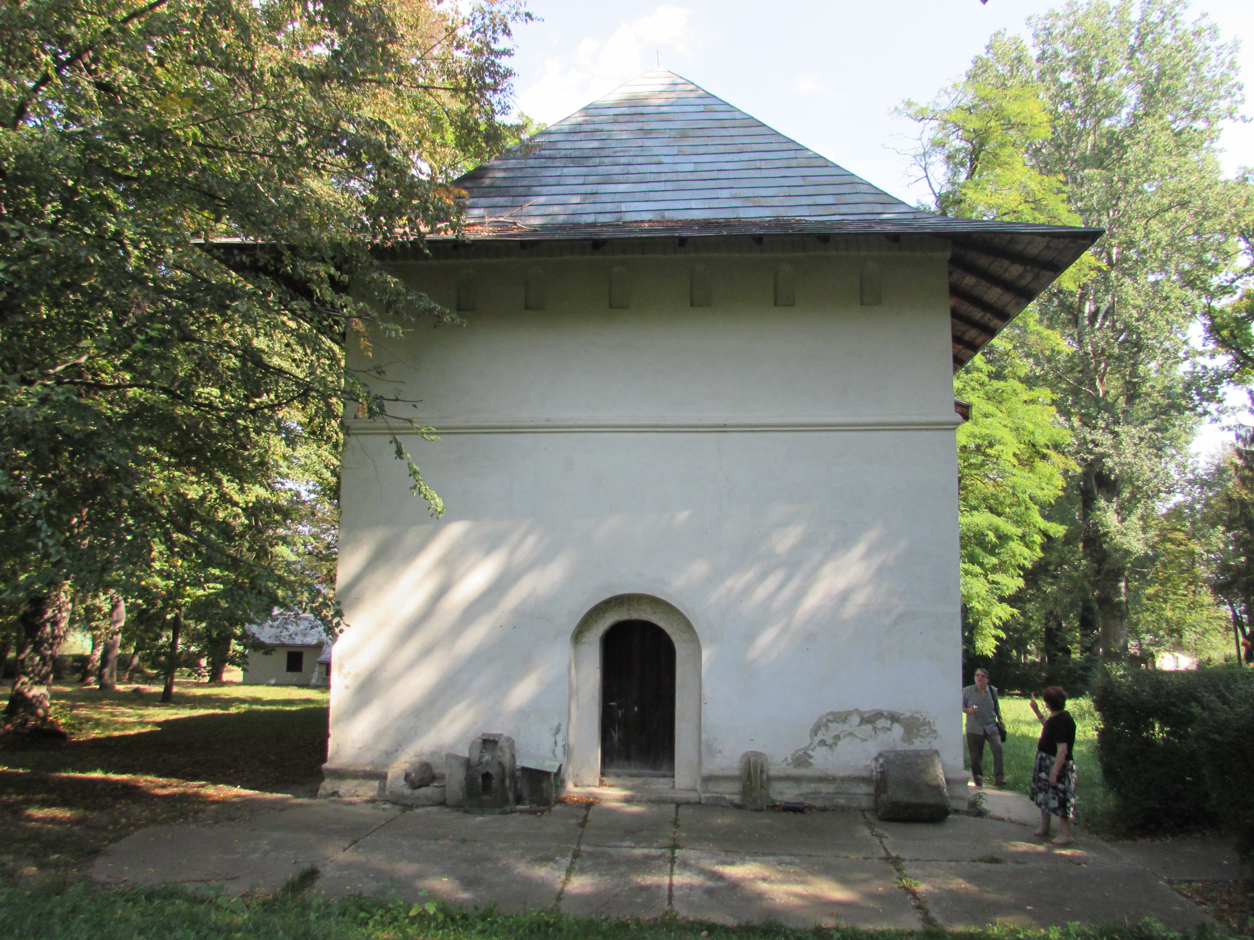 St. George Church of Tescani, Bacău County, Romania 02